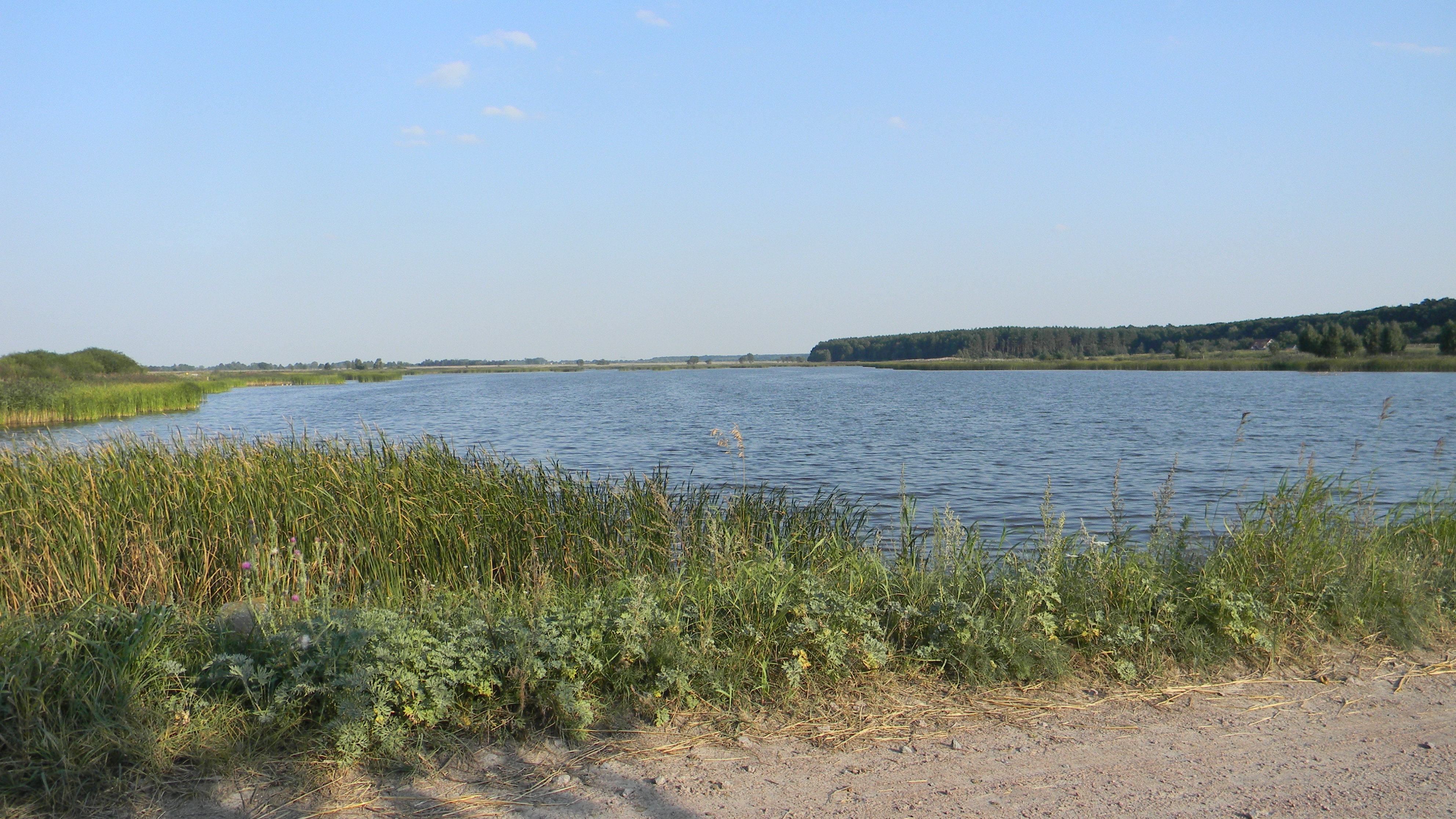 Ставок у Забуянні